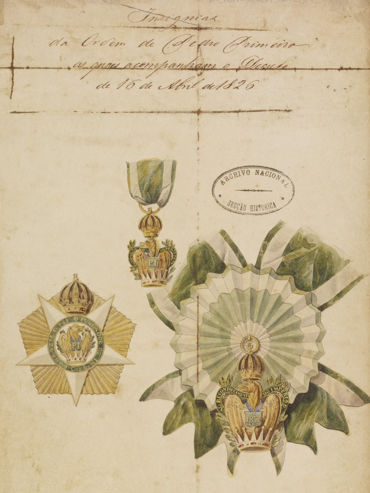 Insígnias da Ordem Pedro I. Ordens Honoríficas